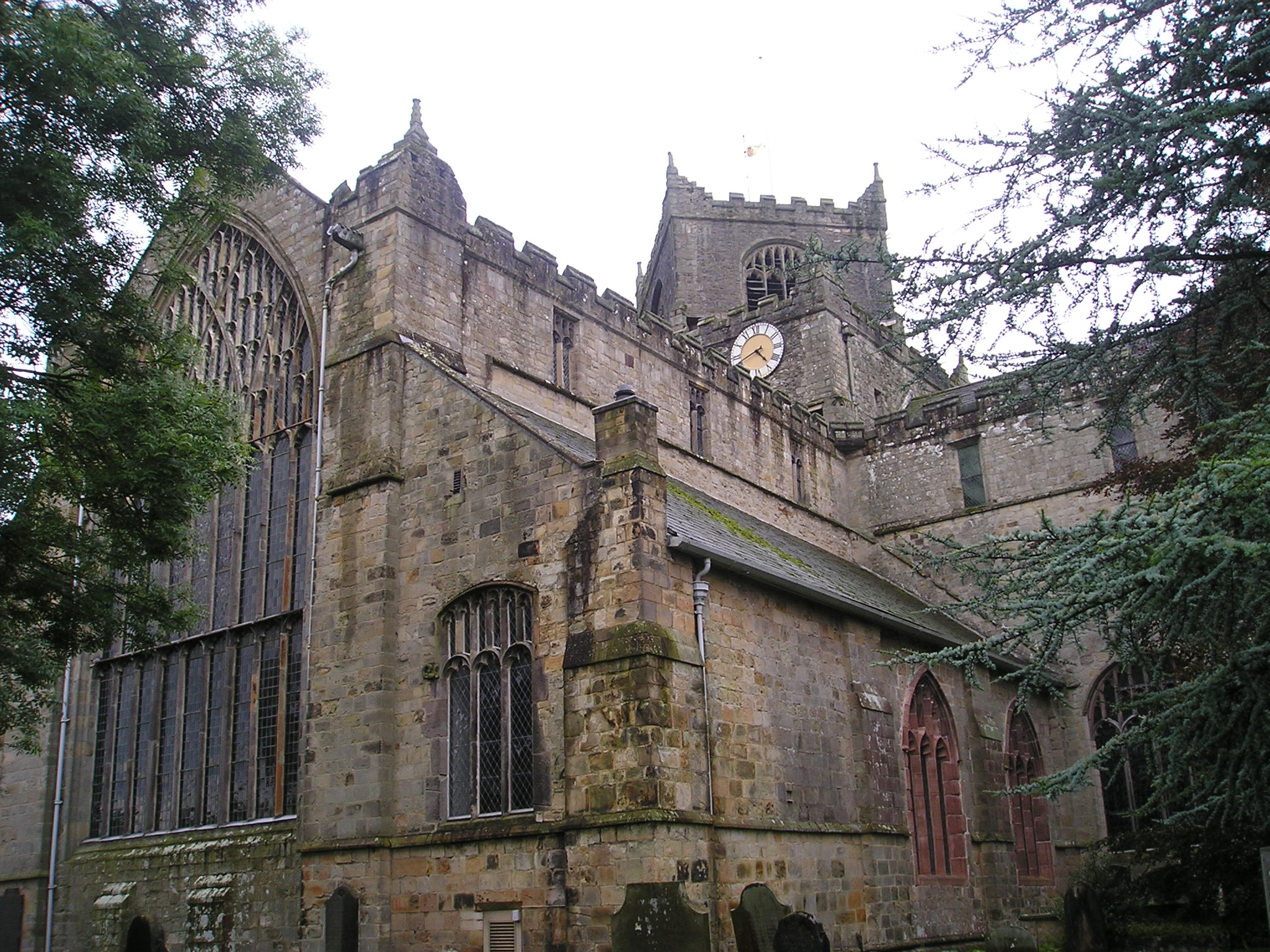 Cartmel, Cumbria, ehemalige Prioreikirche